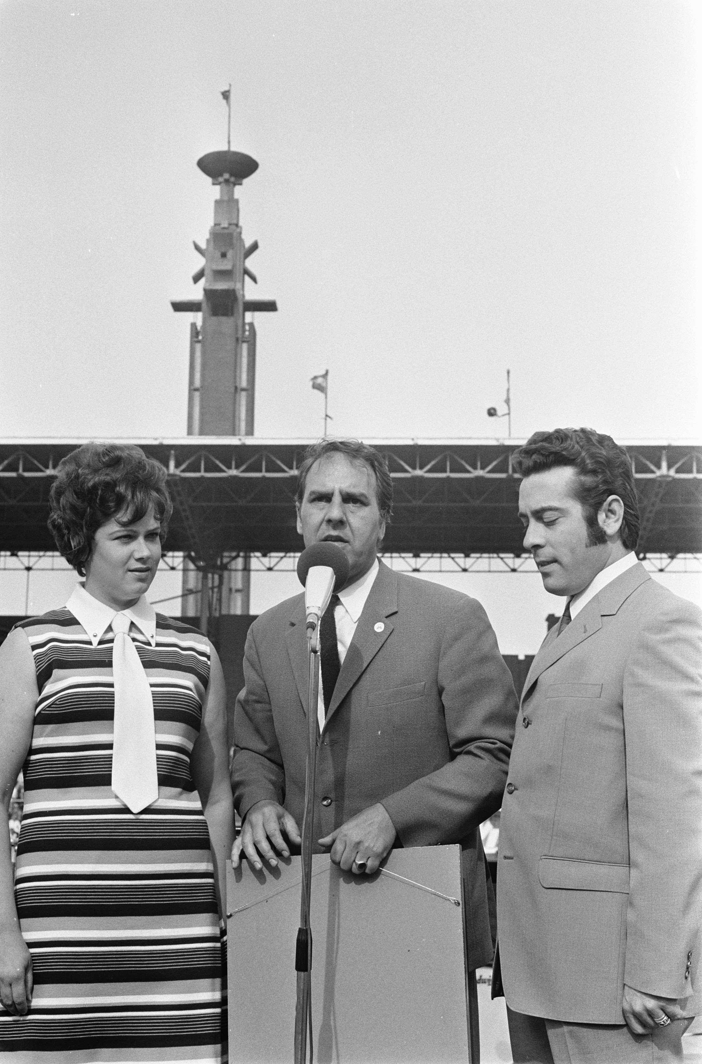 Collectie / Archief : Fotocollectie Anefo Reportage / Serie : [ onbekend ] Beschrijving : Gert en Hermien Timmerman show in Olympisch Stadion, Amsterdam Gert en Hermien Datum : 24 mei 1969 Locatie : Amsterdam, Noord-Holland Trefwoorden : stadions Persoonsnaam : Hermien Timmerman Fotograaf : Mieremet, Rob / Anefo Auteursrechthebbende : Nationaal Archief Materiaalsoort : Negatief (zwart/wit) Nummer archiefinventaris : bekijk toegang 2.24.01.05 Bestanddeelnummer : 922-4565